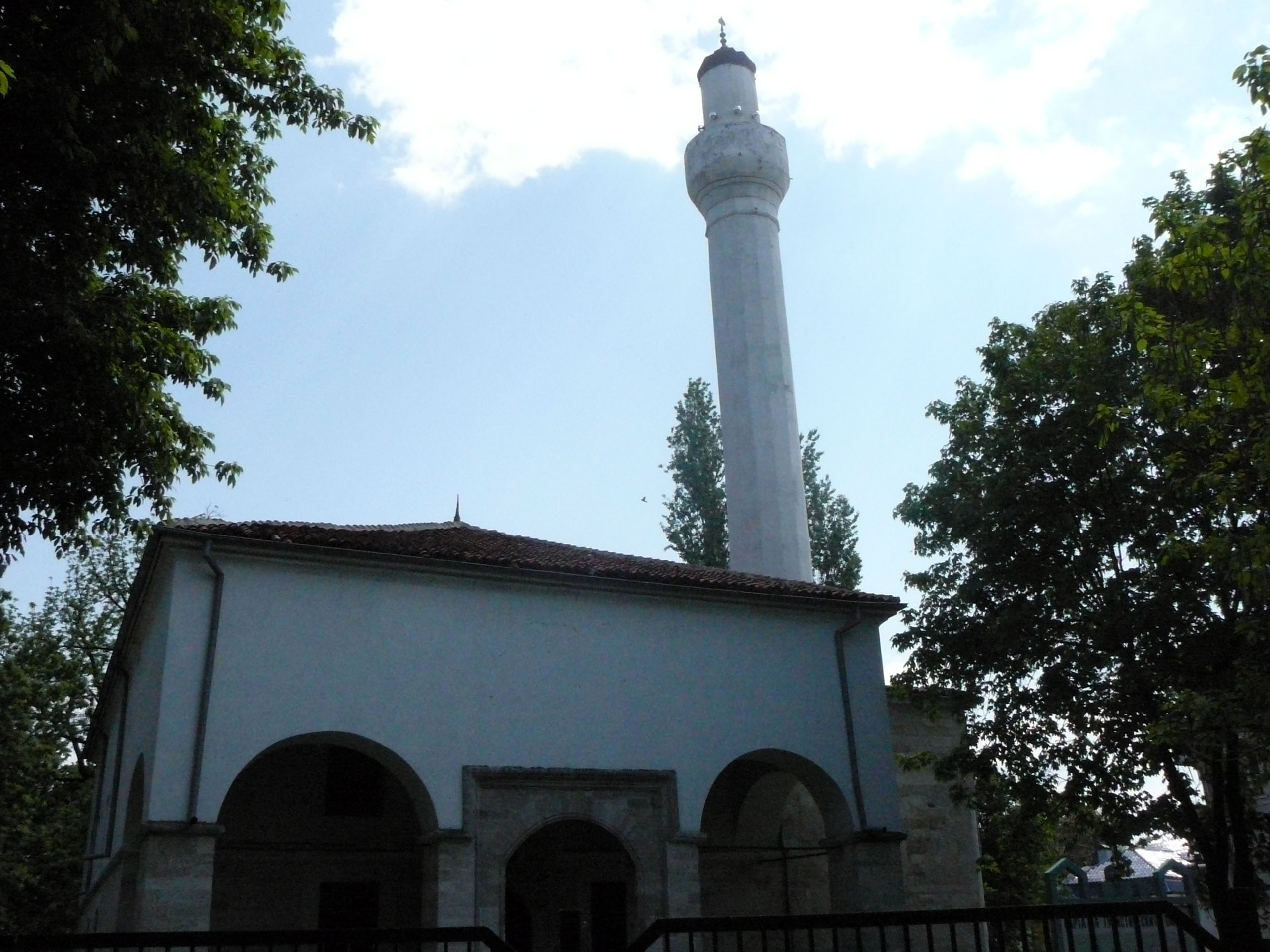 Vidin,Bulgaria; Мавзолей на Мустафа паша